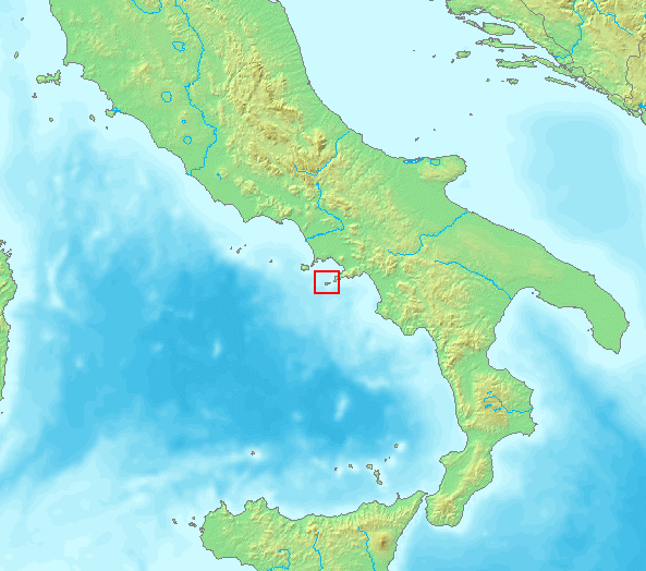 Capri